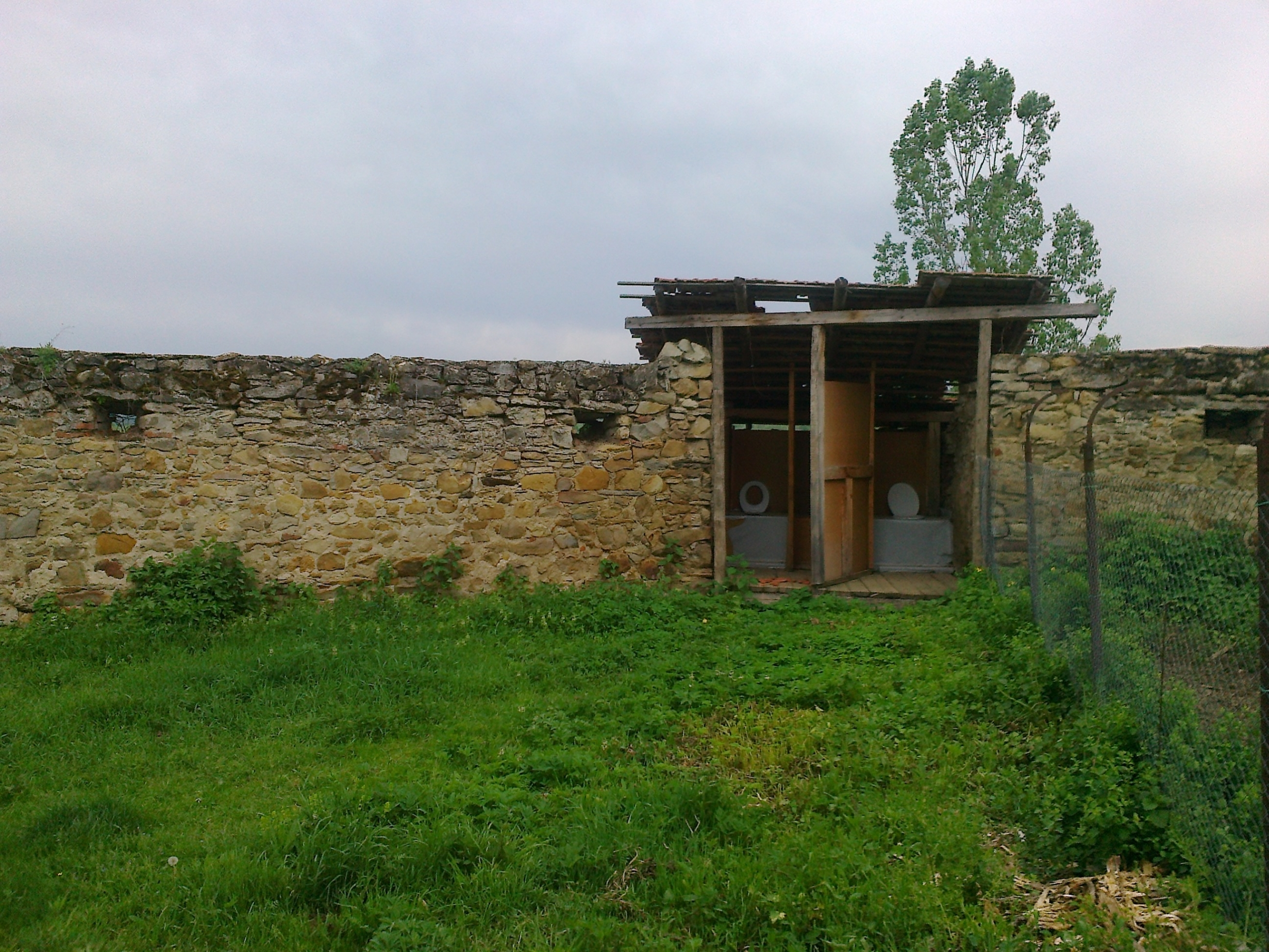 Closete abjecte amenajate in zidul fortificatiei de la Hosman de catre autoritatile preocupate de confortul putinilor turisti care viziteaza din cand in cand monumentul istoric 01